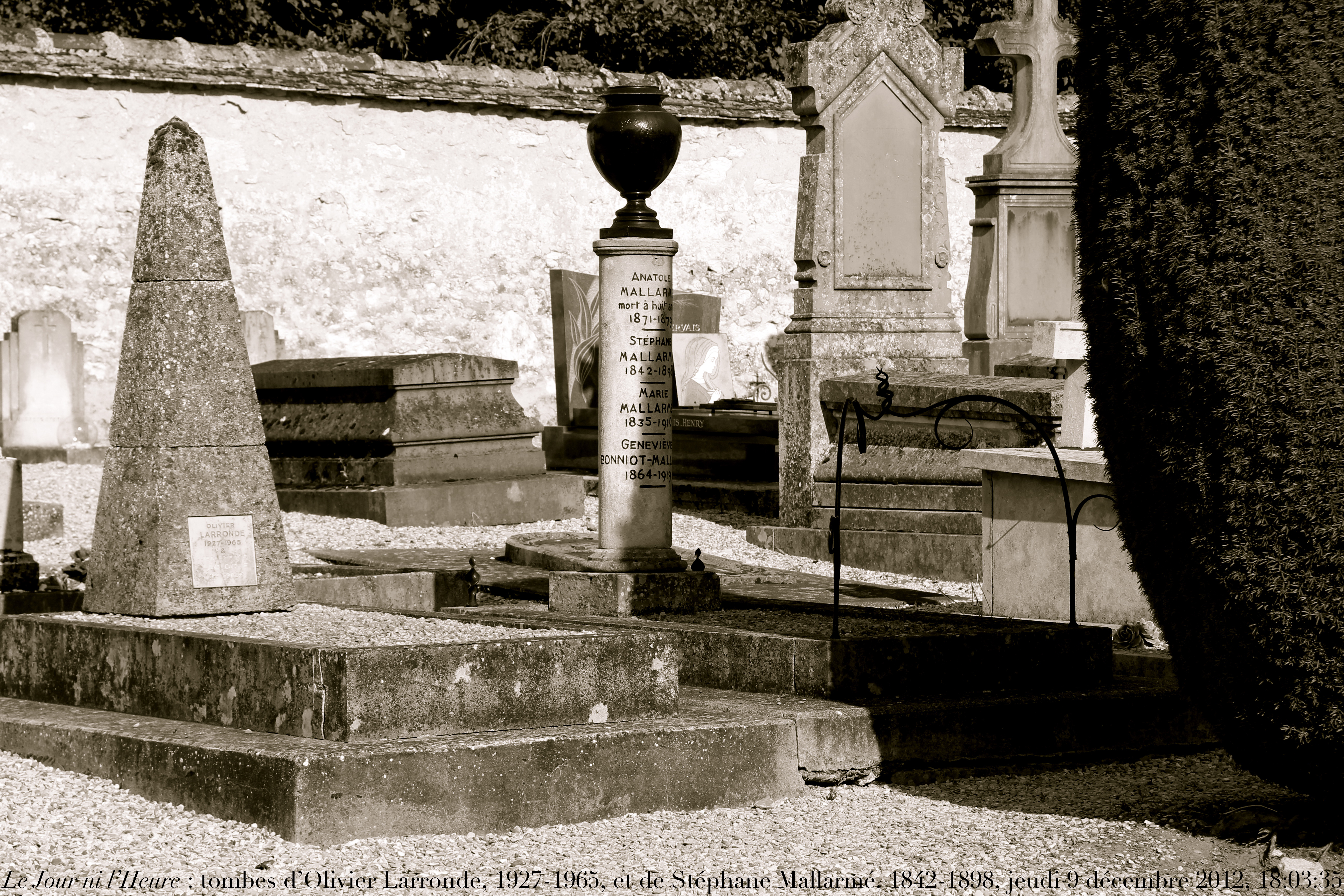 Tombe de Stéphane Mallarmé dans le cimetière de Samoreau